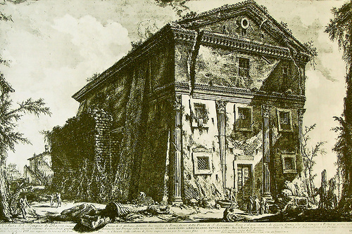 Tempio di Cerere e Faustina, incisione